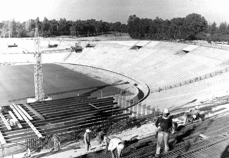 Construcción del Estadio Malvinas Argentinas, Mendoza hacia 1977.